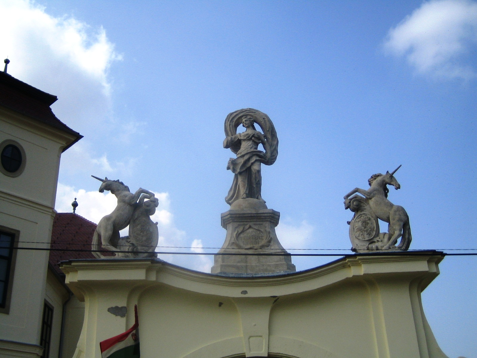 Hajósi Érseki kastély utca felöli bejáratának kapuzata Unknown